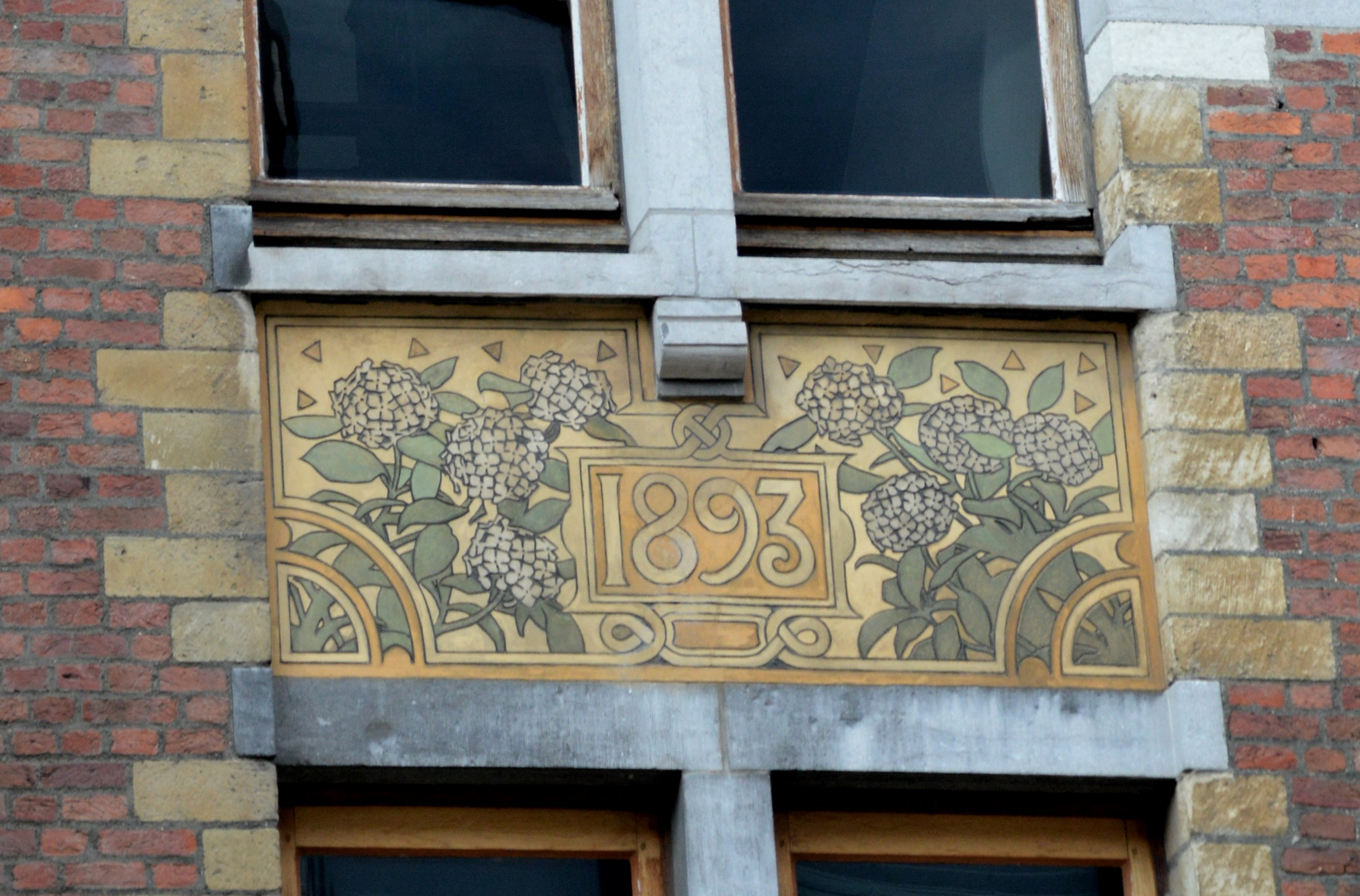 Saint-Gilles, rue Defacqz, 71